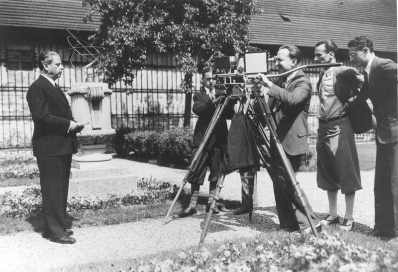 Berlin, Max Reinhardt ADN-Zentralbild-Archiv Prof. Dr. h.c. Max Reinhardt Intendant, Regisseur und Schauspieler. Mitbegründer der Salzburger Festspiele. geboren 9. 9. 1873 in Baden/Wien; gestorben 30. 10. 1943 in New York UBz: Prof. M. Reinhardt wird anläßlich eines Jubiläums im Garten seines Heims gefilmt. Aufnahme 1930. 18979-30 [Scherl Bilderdienst] Abgebildete Personen: Reinhardt, Max Prof. Dr.: Intendant, Regisseur, Schauspieler, Direktor Deutsches Theater Berlin, Deutschland